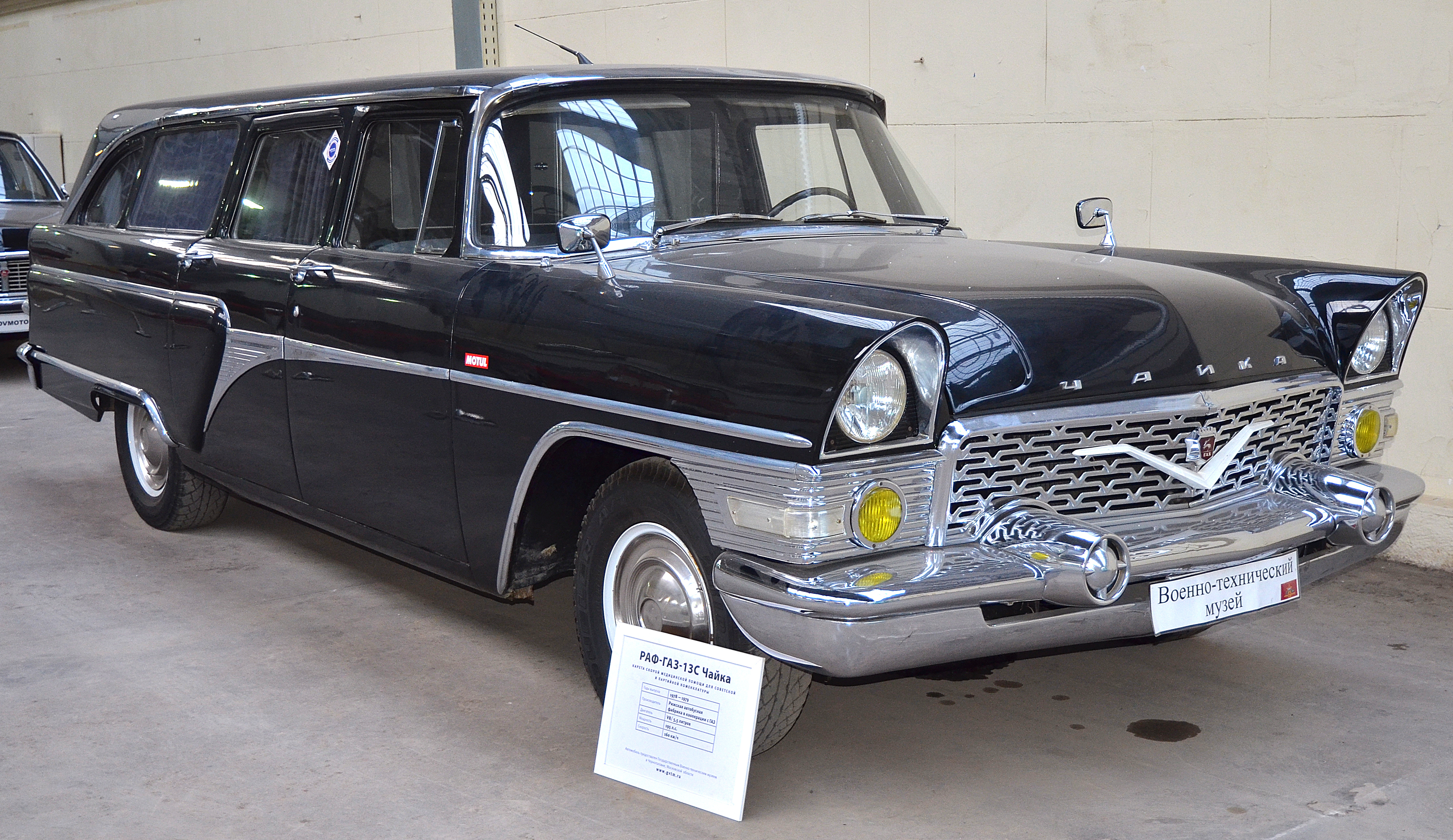 Можно увидеть здесь : You can see here